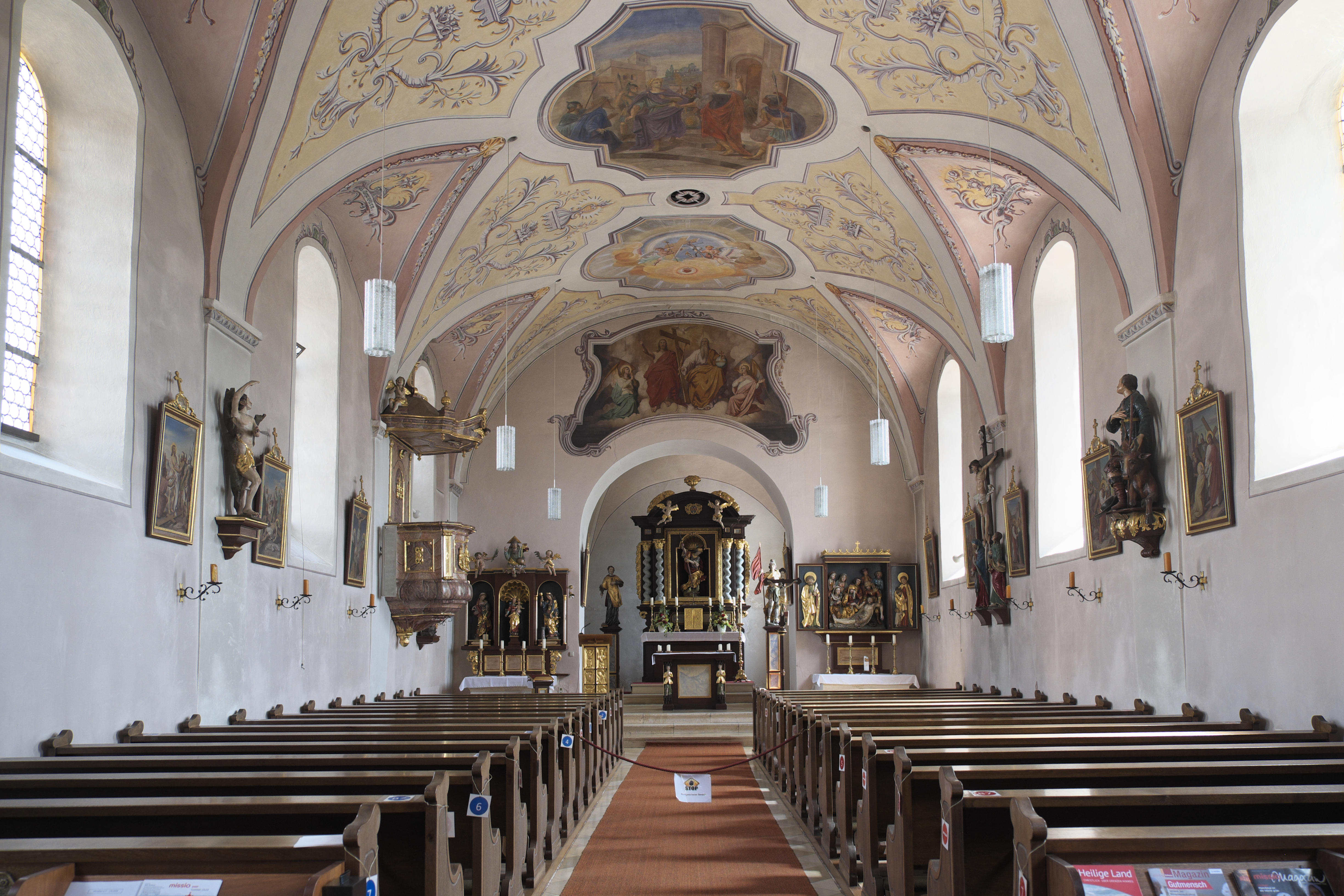 Katholische Kirche St. Georg in Hienheim (Neustadt an der Donau) im niederbayerischen Landkreis Kelheim (Bayern/Deutschland)